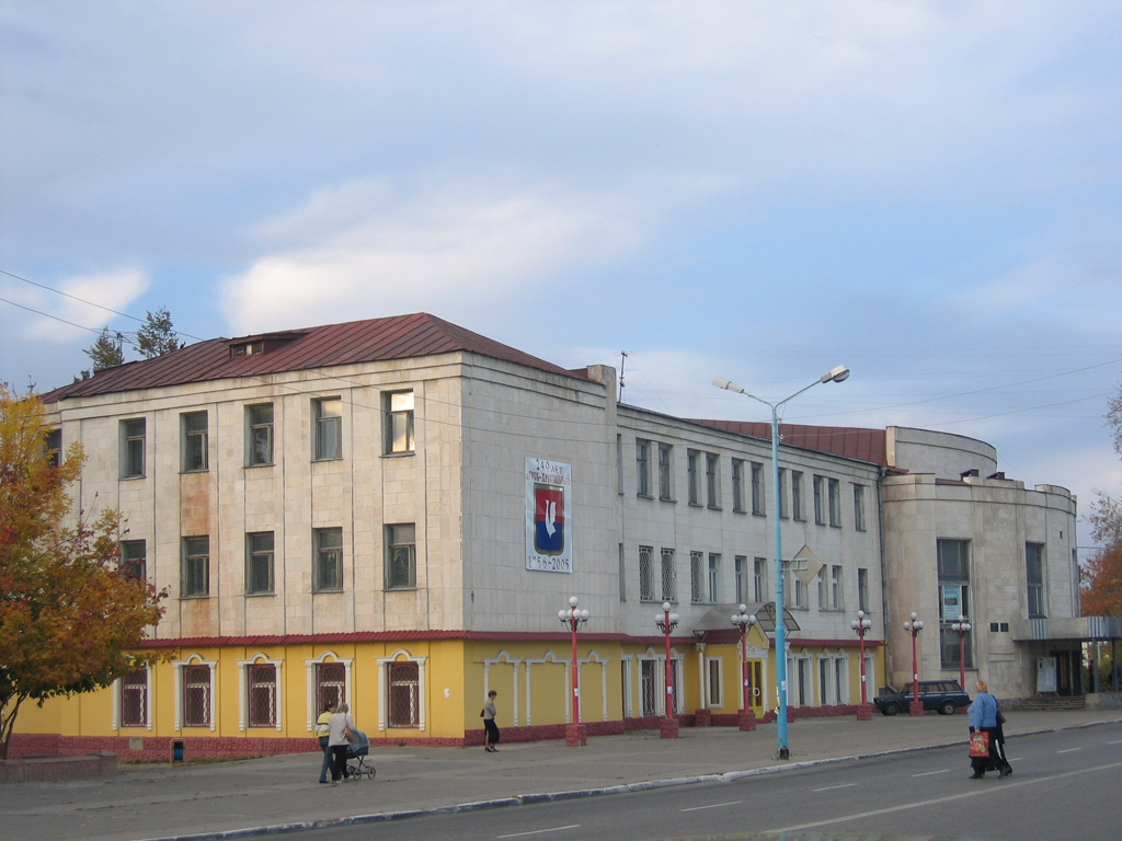 グシ＝フルスタリヌイの街並み.